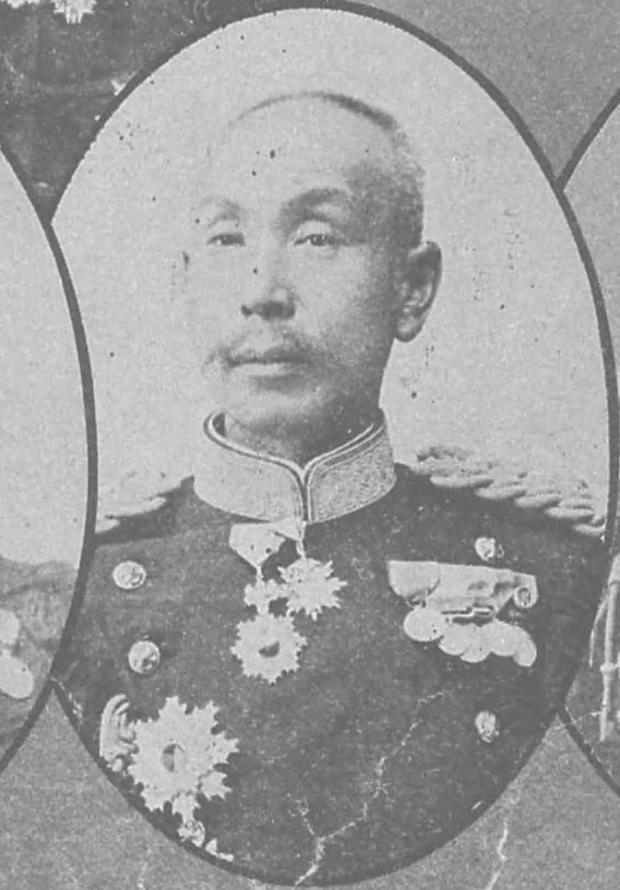 小川又次（1848-1909）